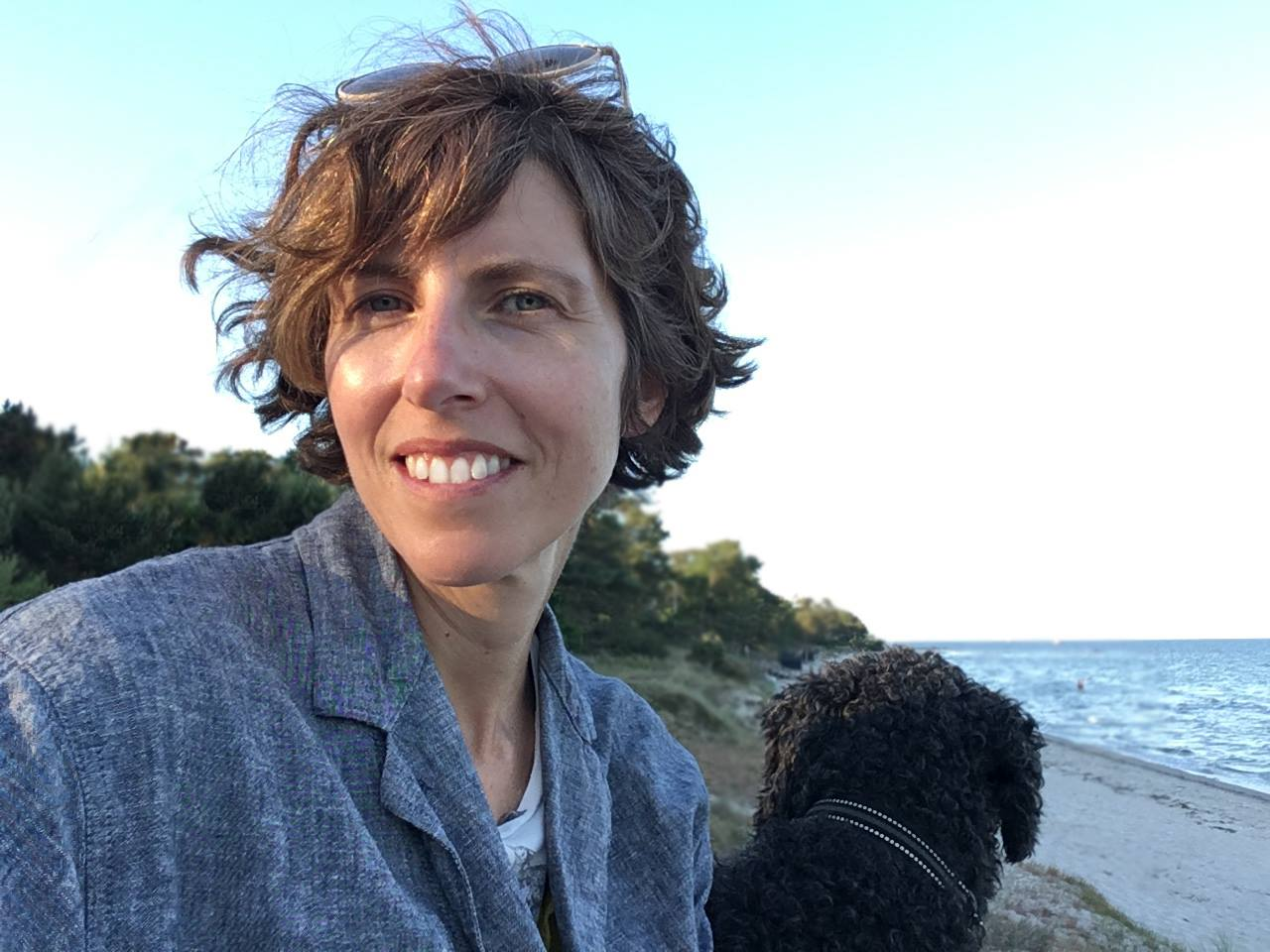 Emma Virke på hundpromenad